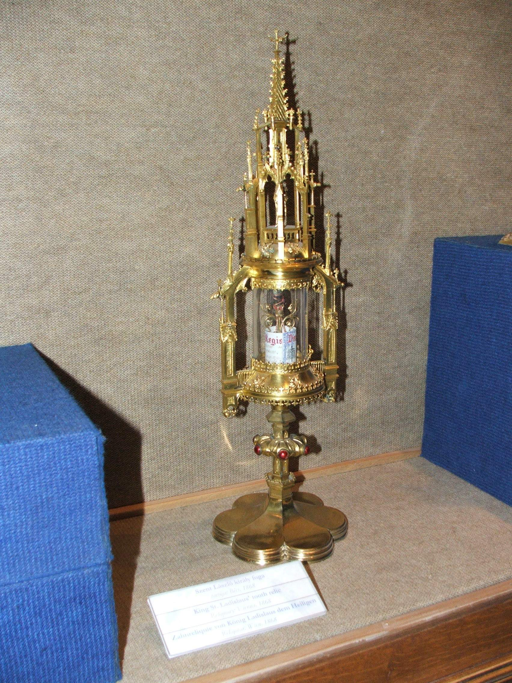 Szent László foga, Esztergom